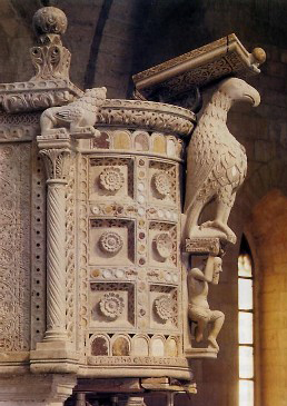 Cattedrale di Bitonto